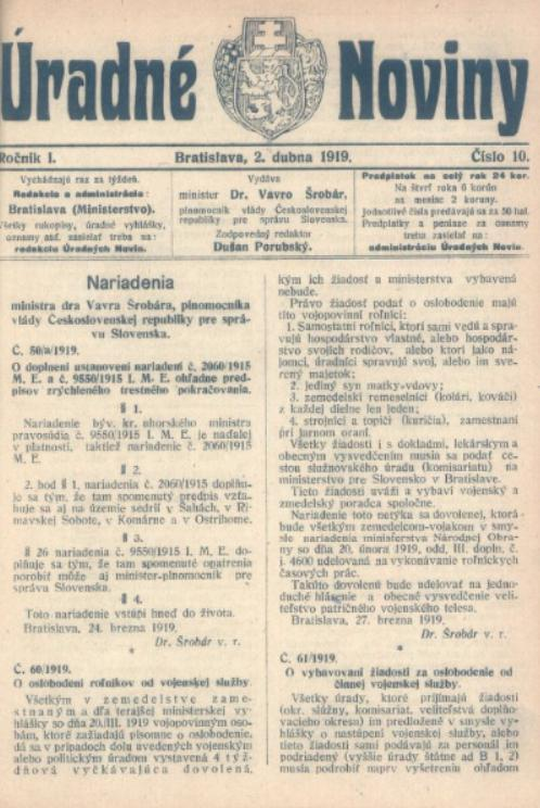 Titulný list týždenníka Úradné noviny.